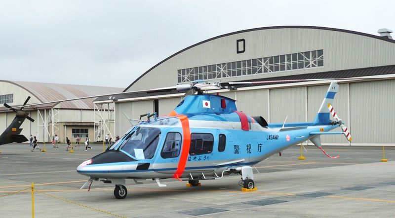 警視庁のヘリコプター、はやぶさ4号。立川防災航空祭にて撮影。